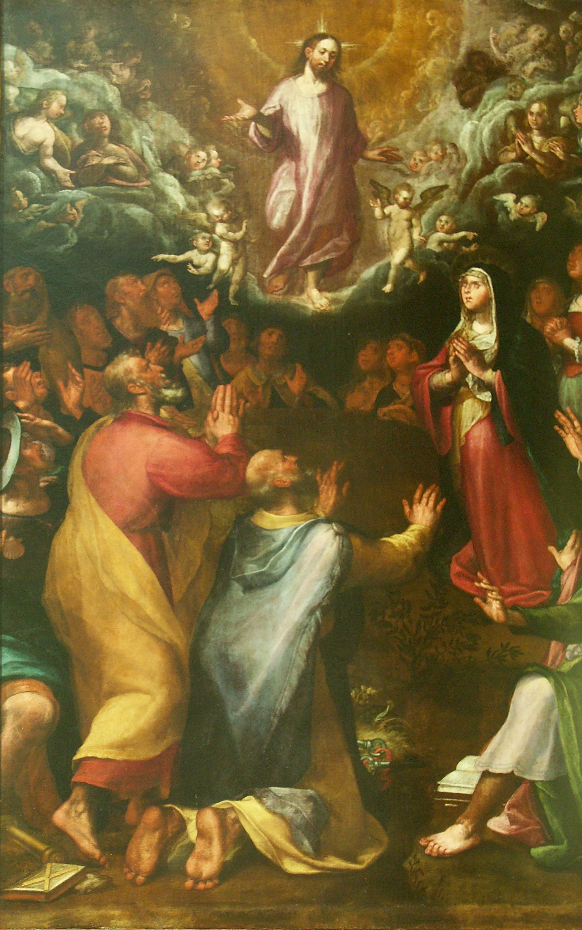 Alonso de Herrera, Ascensión de Cristo (1617). Segovia, S. Andrés